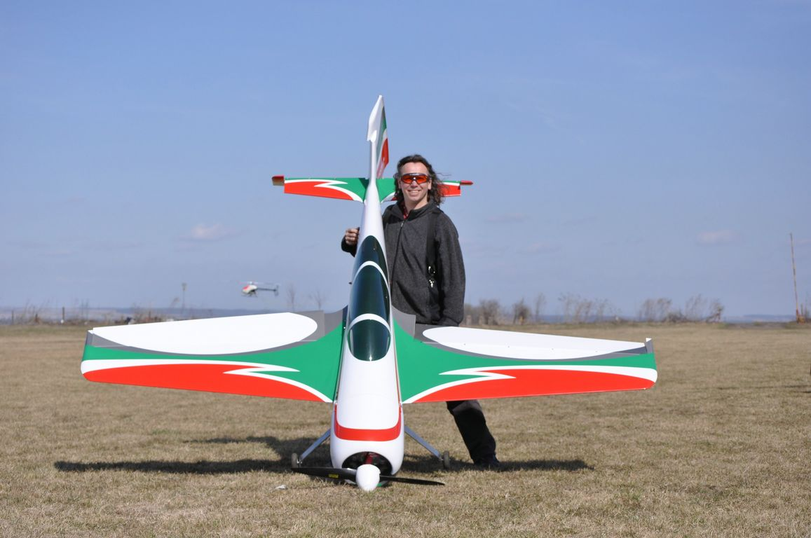 Daniel Krob Obří model SU 29